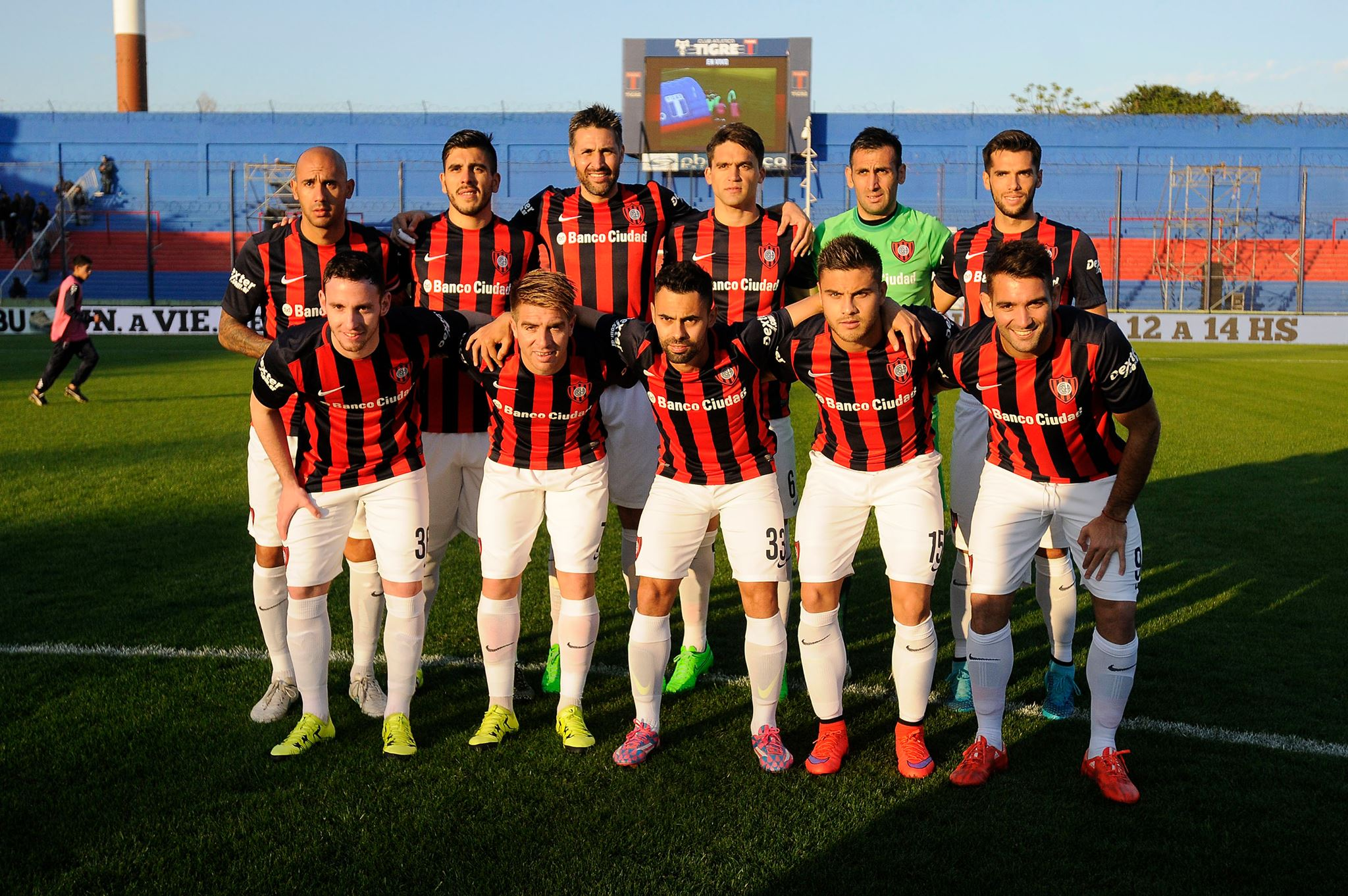 11 inicial del Club Atlético San Lorenzo de Almagro en 2015.